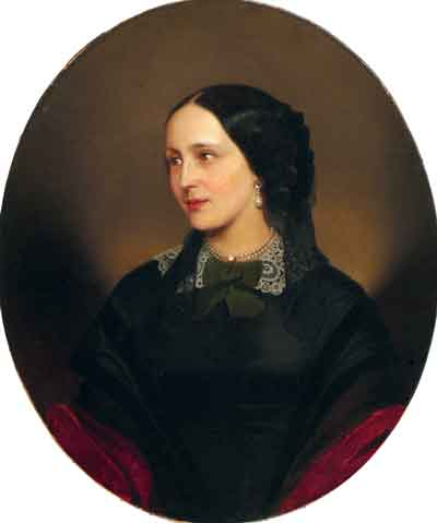 К. И. Лаш. Н. Н. Ланская. 1856. Холст, масло. Частная коллекция